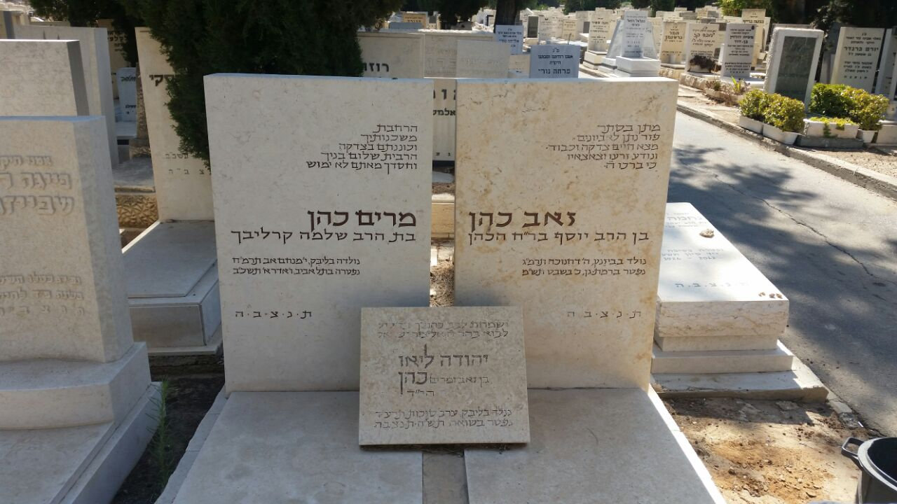 מצבה לזכרו של ליאו כהן, לצד קבר הוריו